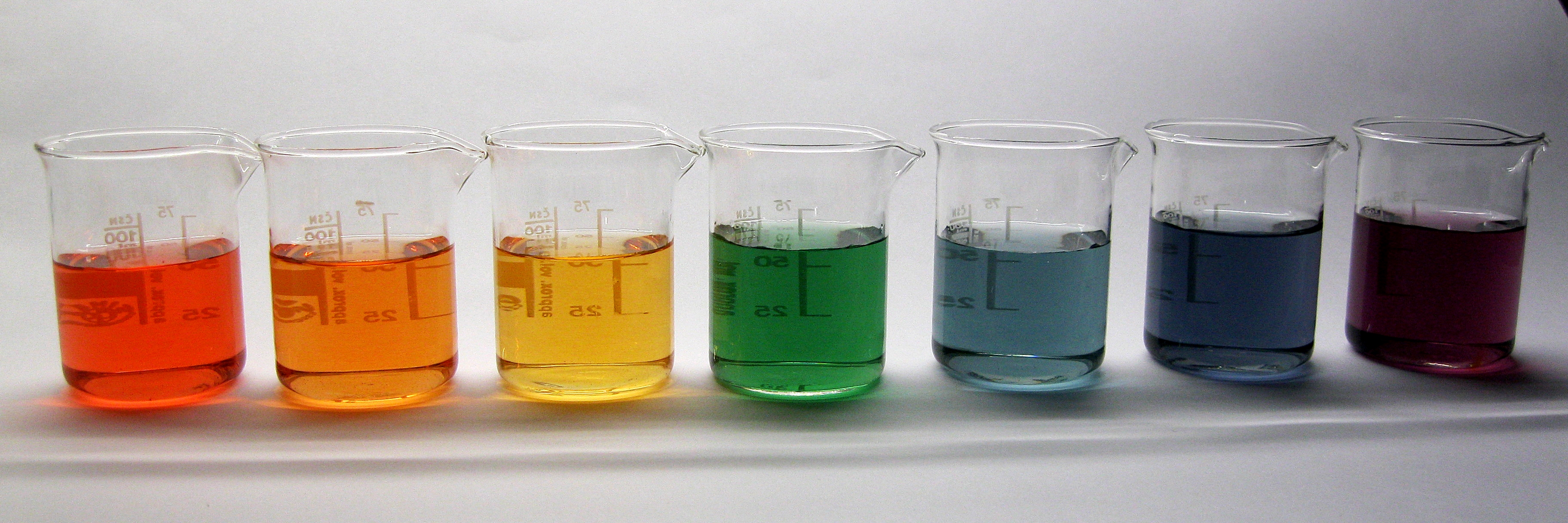 SPEKTAR BOJA